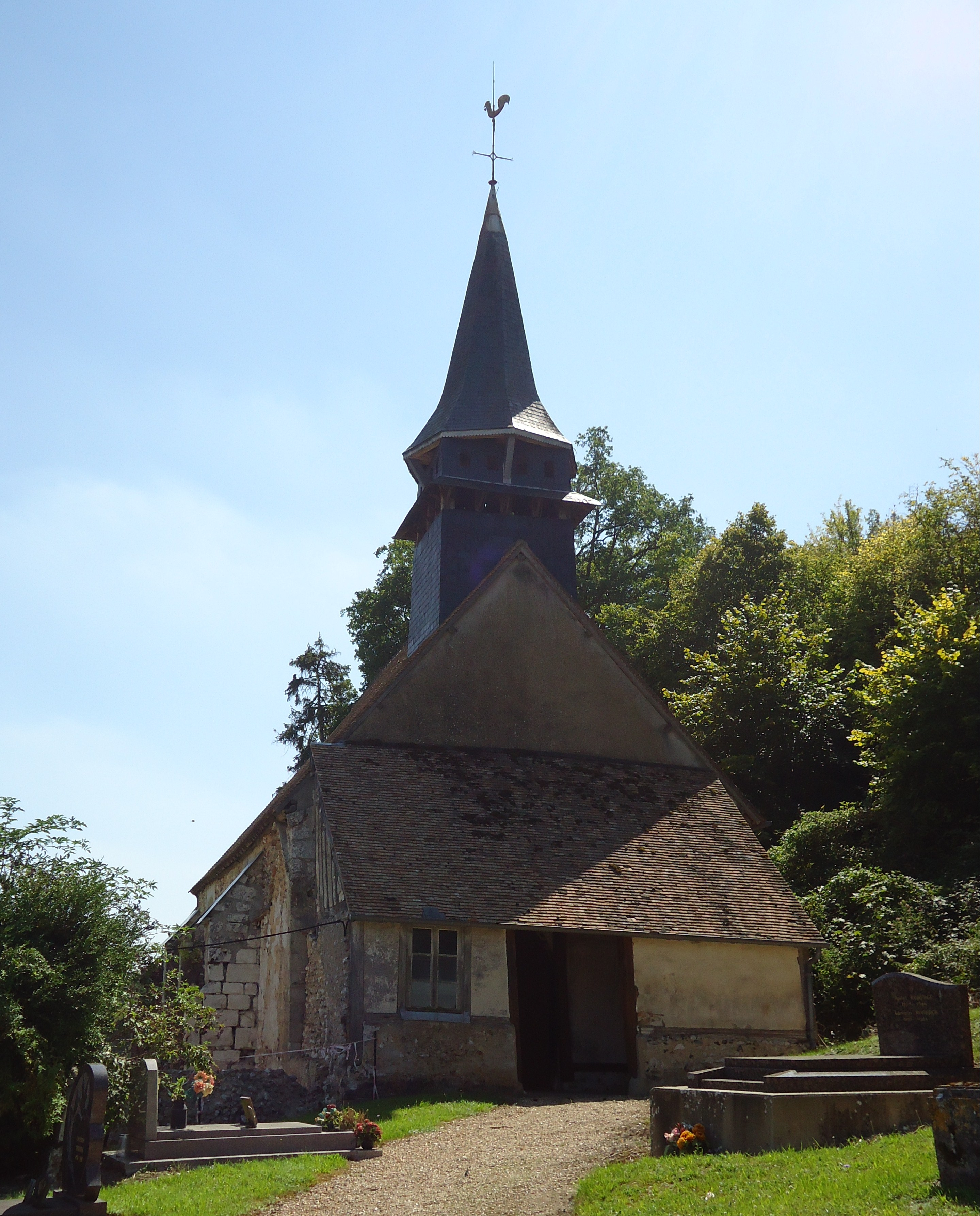 Eglise Saint-Denis et Saint-Martin - Gadencourt - Eure (27)